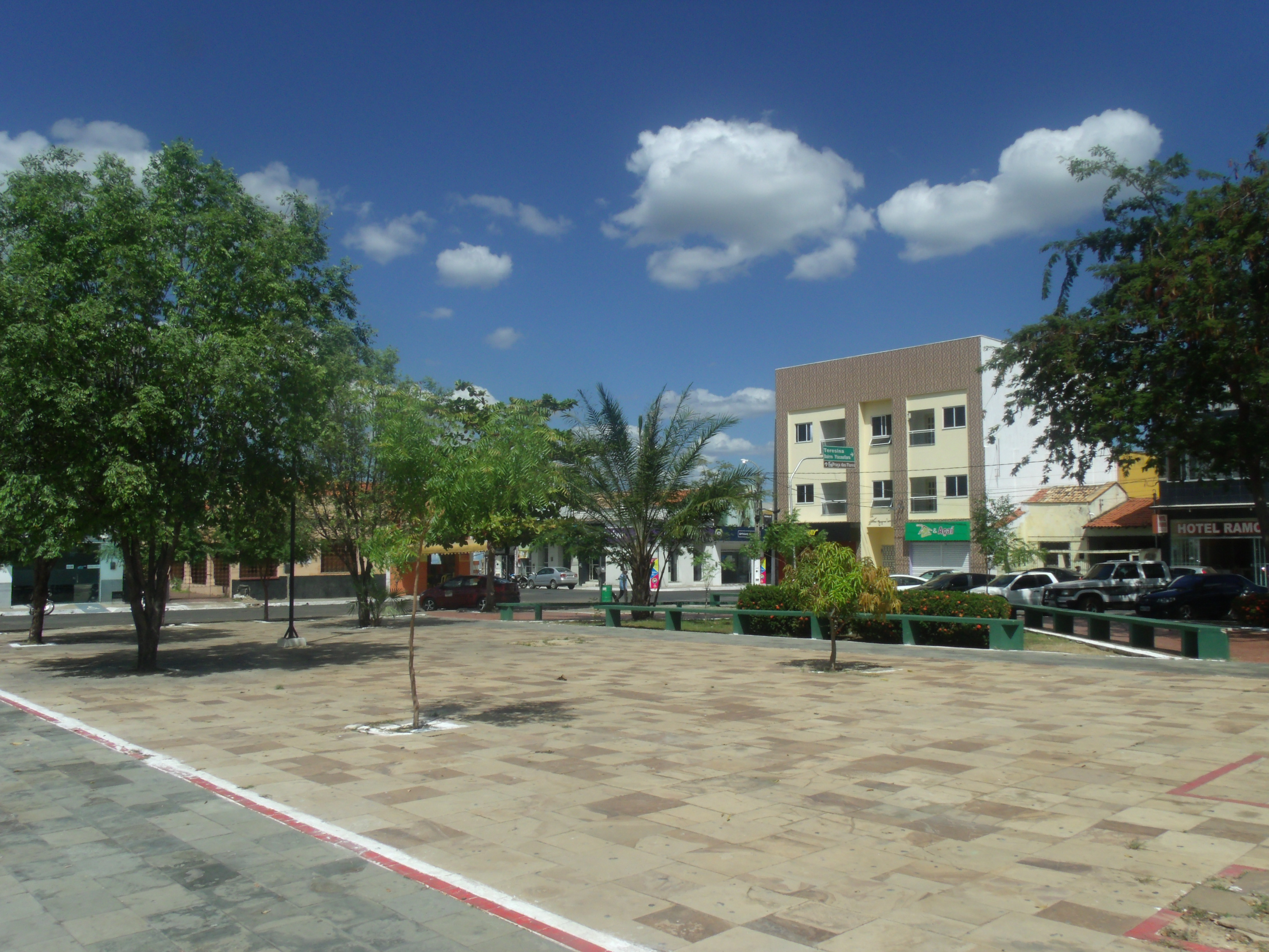 Vista parcial da Praça da Matriz em Piripiri em julho de 2018.